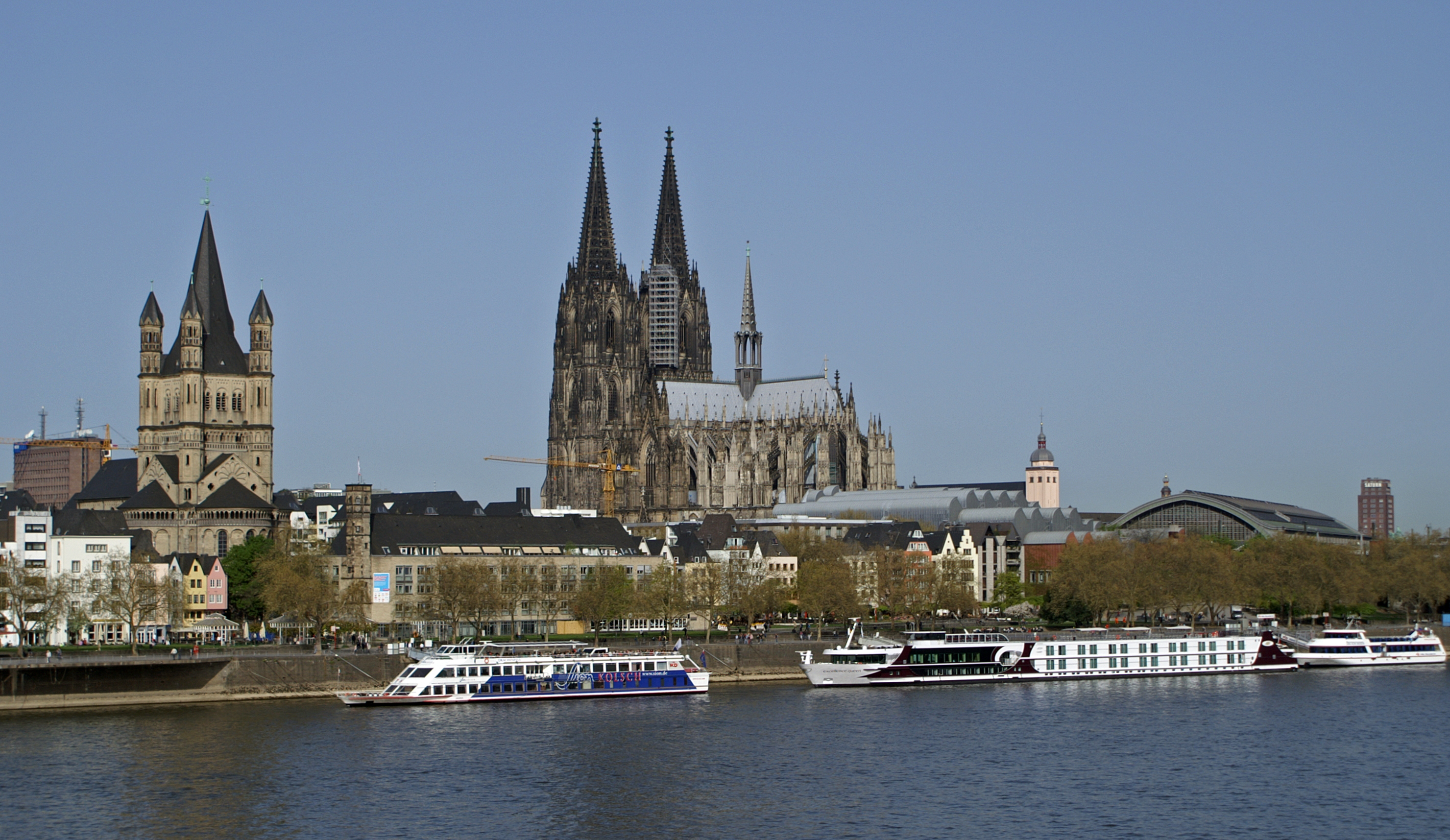 Flusskreuzfahrtschiff Excellence Queen am Anleger Köln.